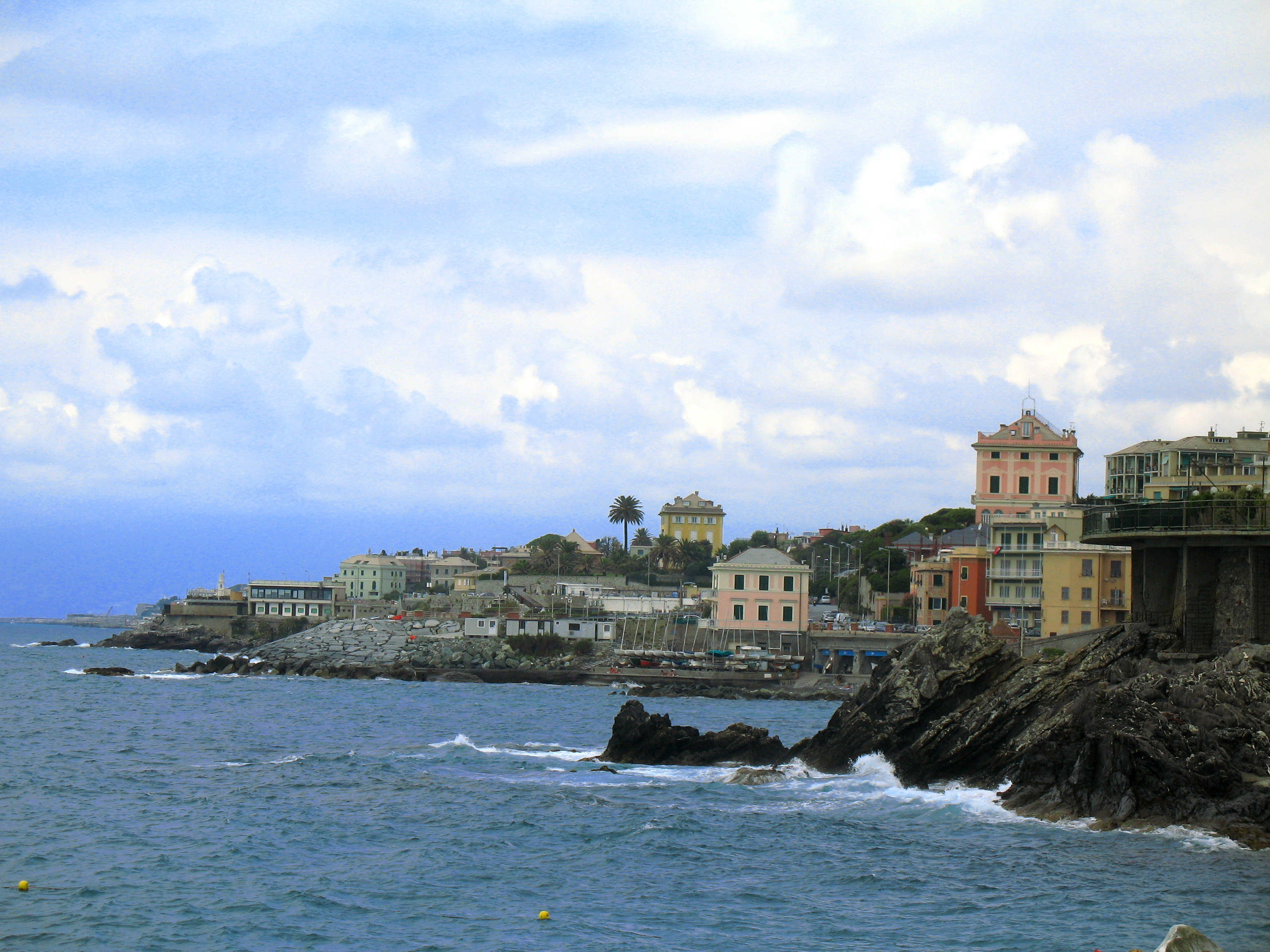 Genova, quartiere di Quinto al mare Spiaggia dello Scalo